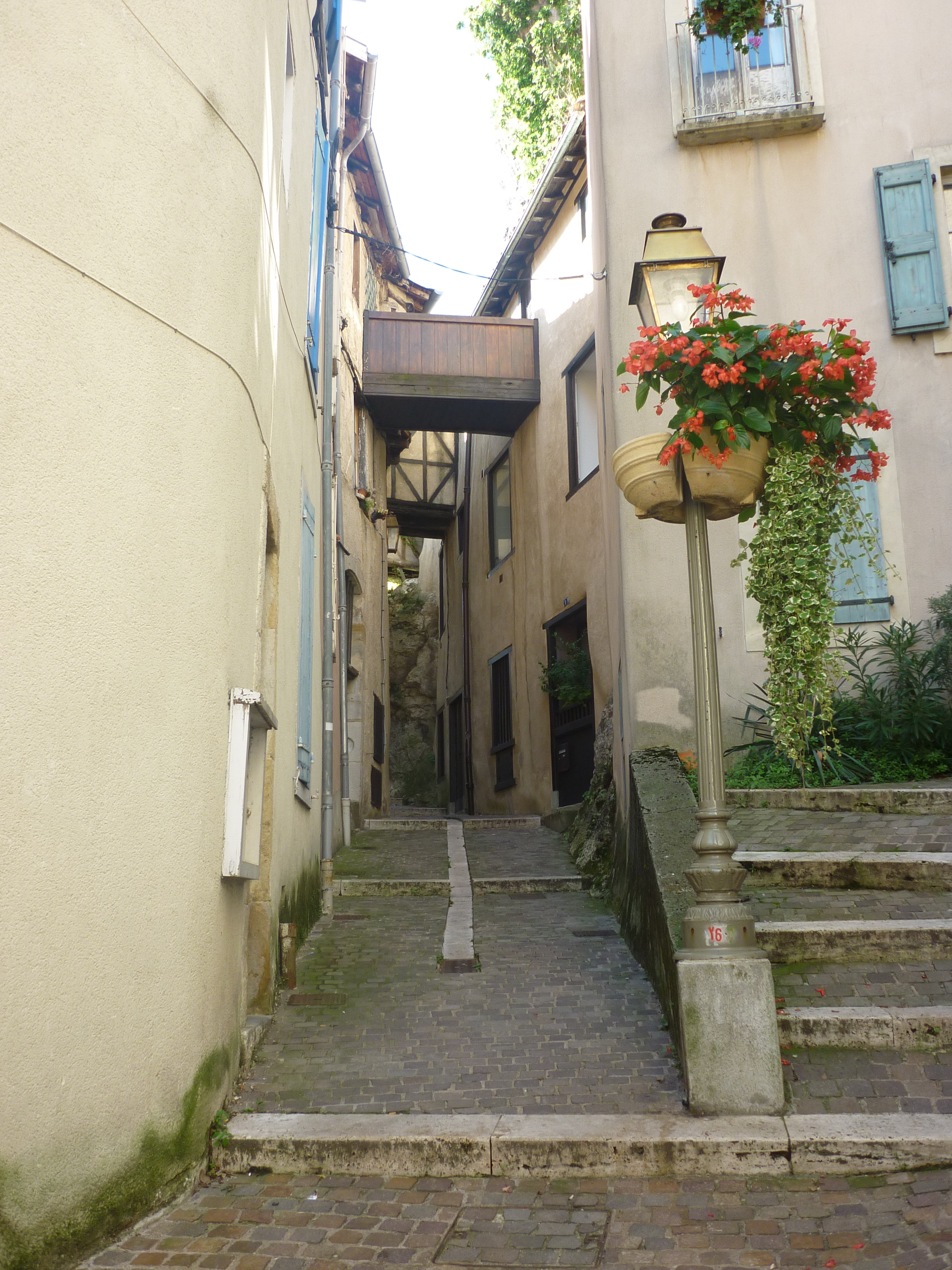 une petite rue médiévale de Foix (Ariège), la rue des Grands Ducs, ruelle étroite et "pontils" , non loin du château.